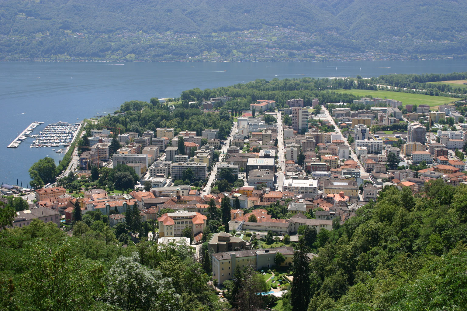 Aussicht auf Locarno von Madonna del Sasso Bild von Steven Utiger, Juli 2005 OTRS 20:34, 28. Jul 2006 Ticket#: 2006072810016318